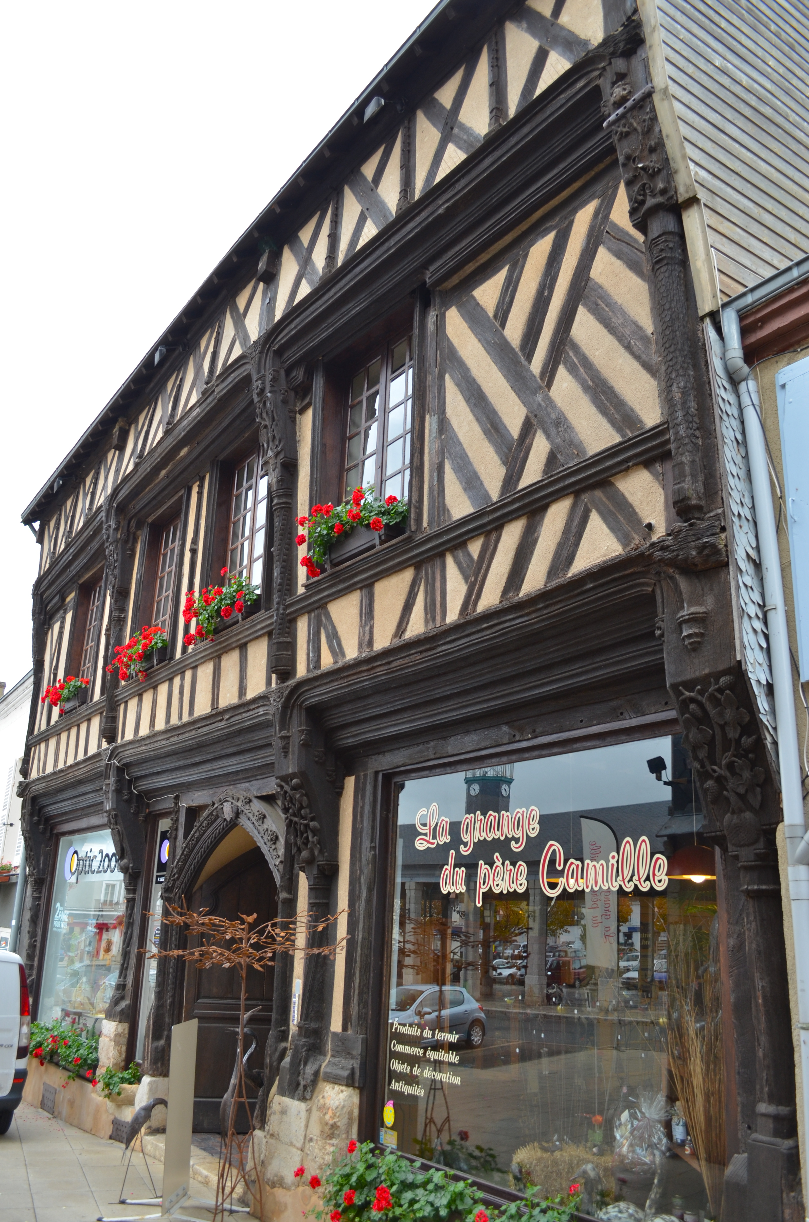 Maison à pans de bois du 15e siècle. (Brou, département d'Eure-et-Loir, région Centre).)